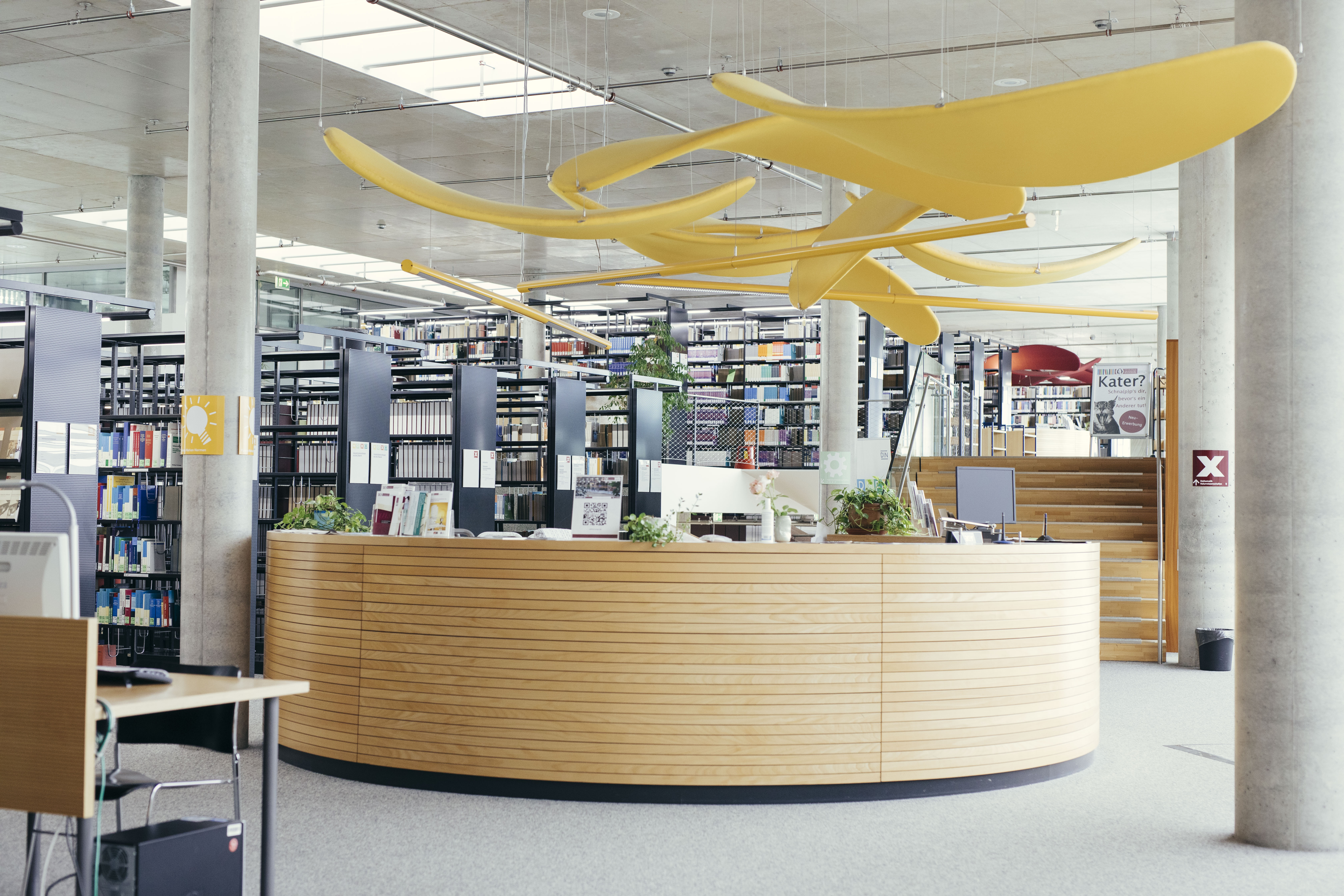 PIZ-Theke